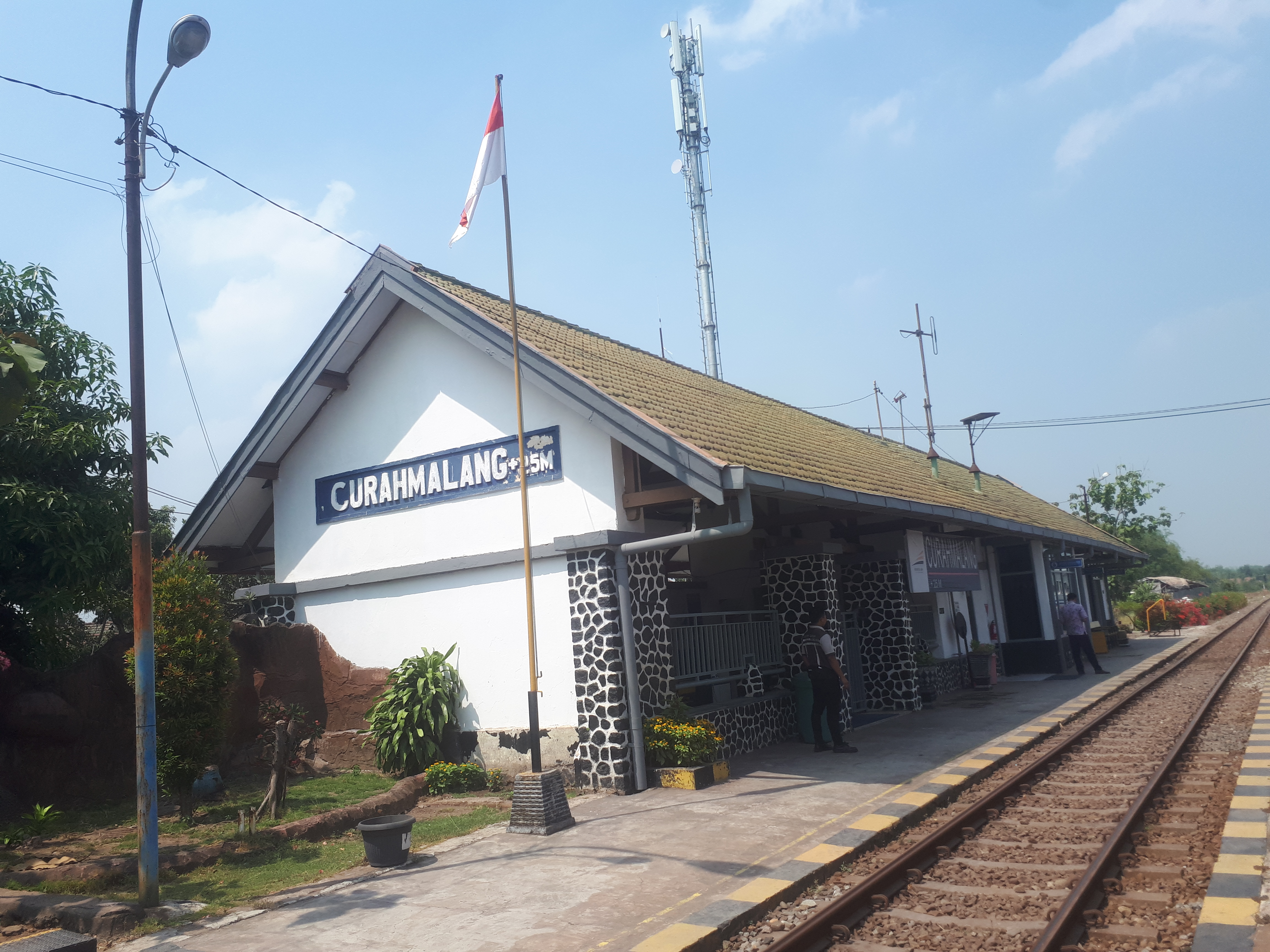 Stasiun Curahmalang tahun 2019.